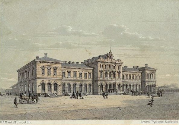 Bergslagsbanas stationshus i Göteborg. Arkitekt Hjalmar Kumlien